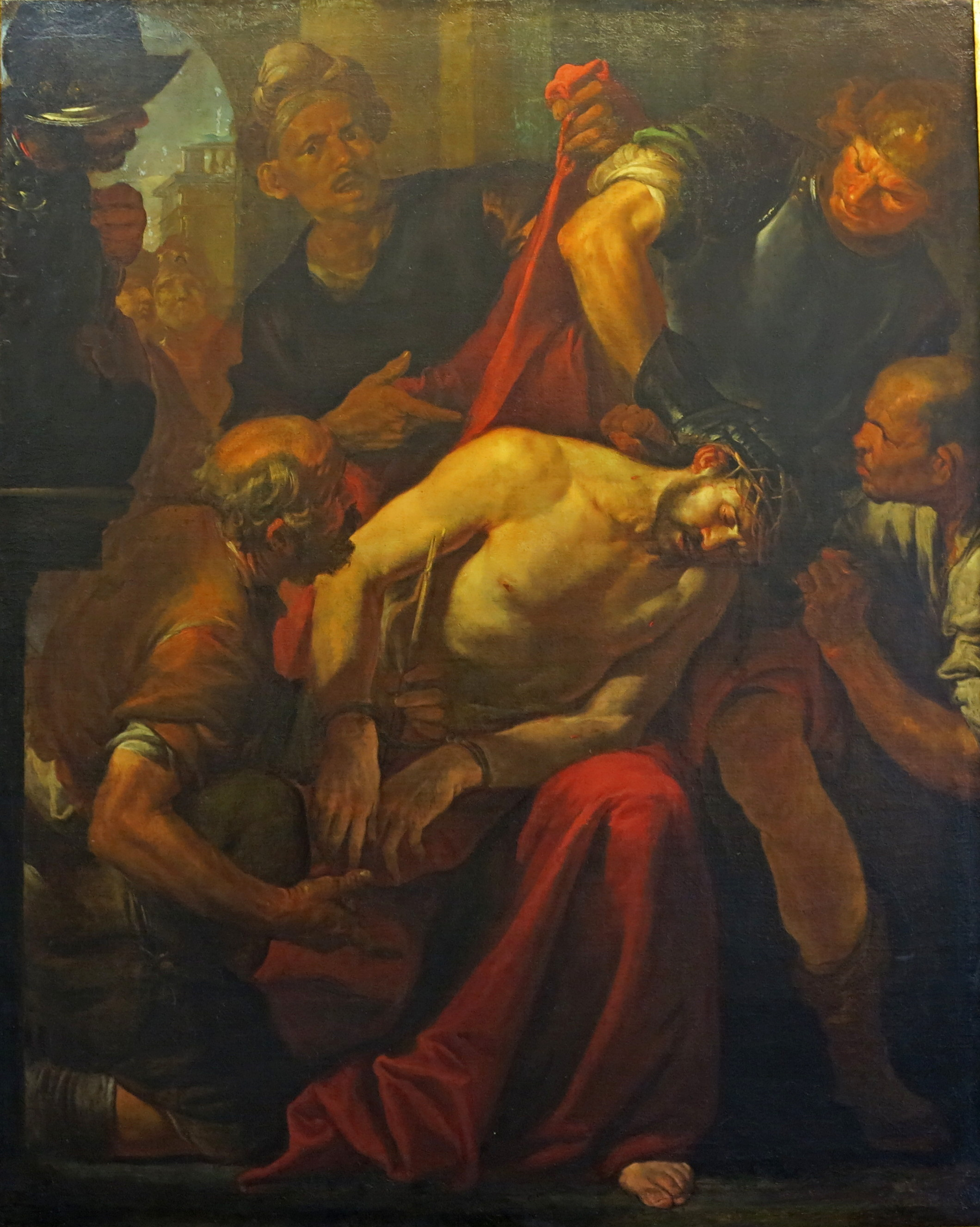 Palazzo Bianco o Palazzo Doria Brignole - Musei di Strada Nuova This is a photo of a monument which is part of cultural heritage of Italy.